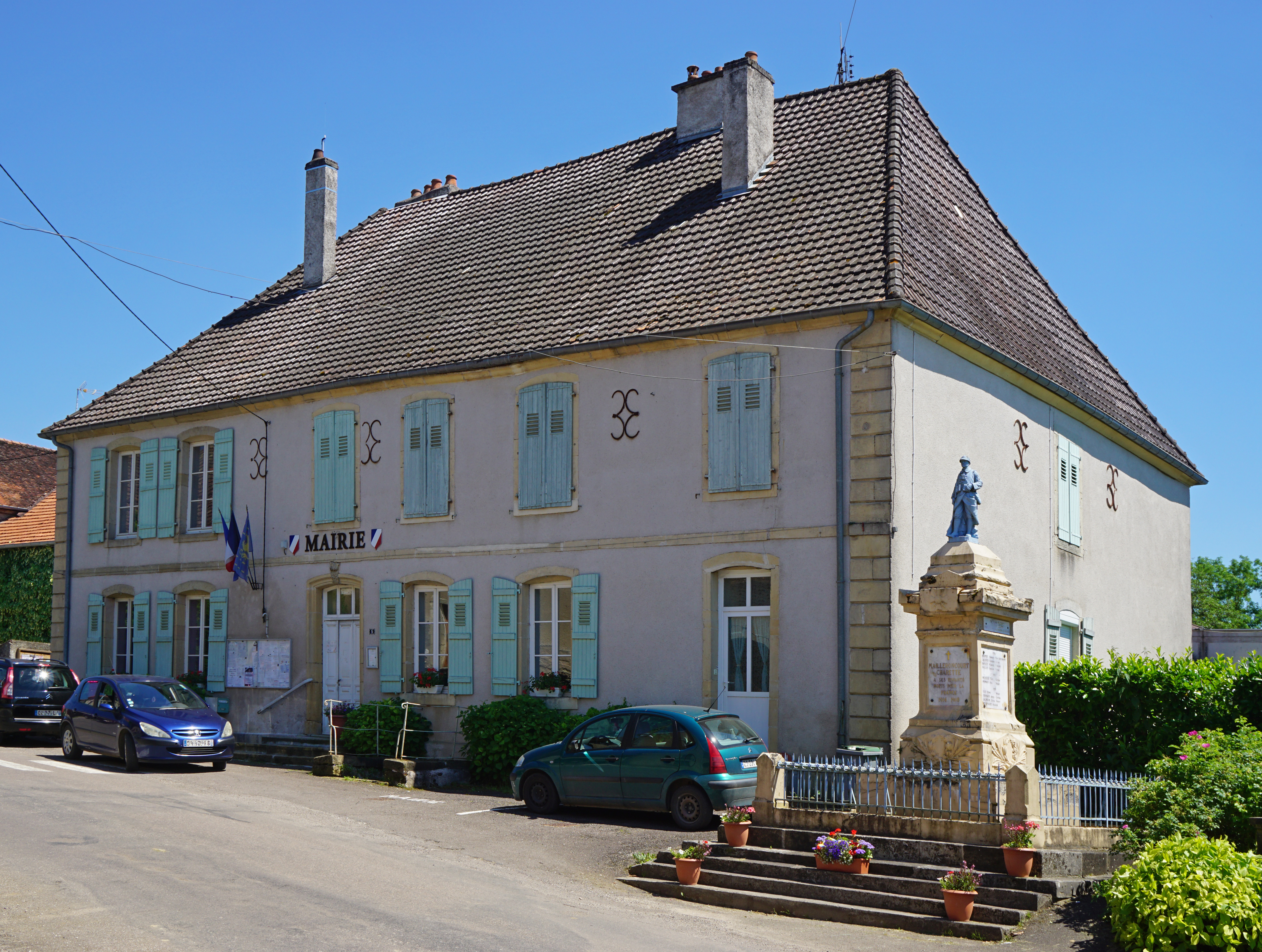 Mairie de Mailleroncourt-Charette.